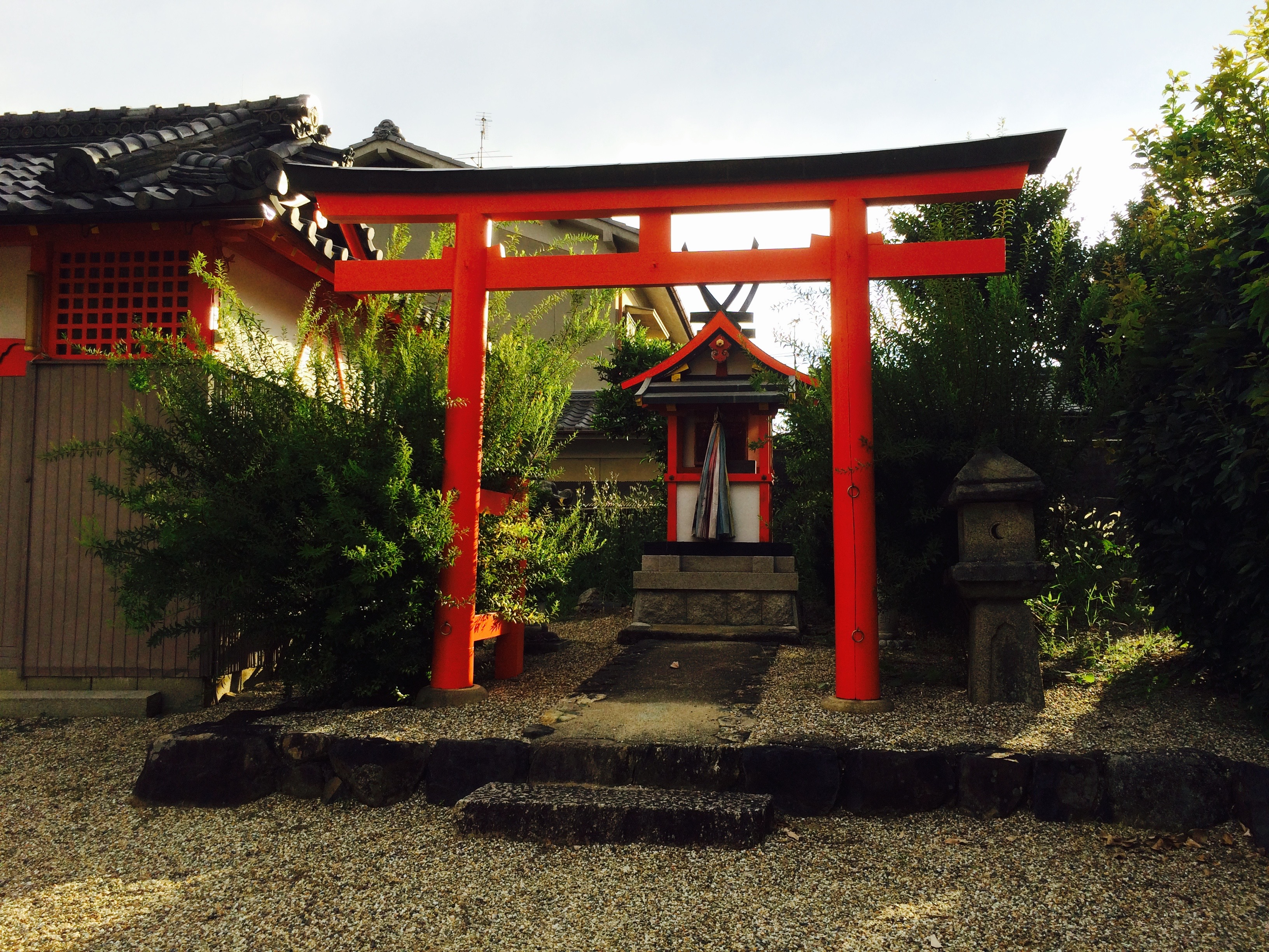 奈良市宅春日神社境内社